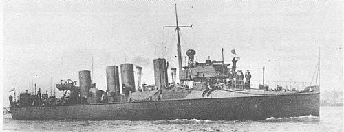 Der britische Zerstörer ARAB